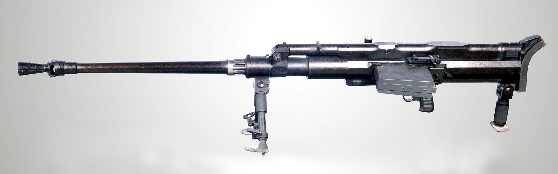 Tankbüchse SOLO S18-100